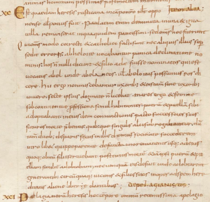 Августин в книге «De Haeresibus ad Quodvultdeum Liber Unus» («Ереси, попущением Бога, в одной книге») о авелианах. «Smaragdus». рукопись IX века.